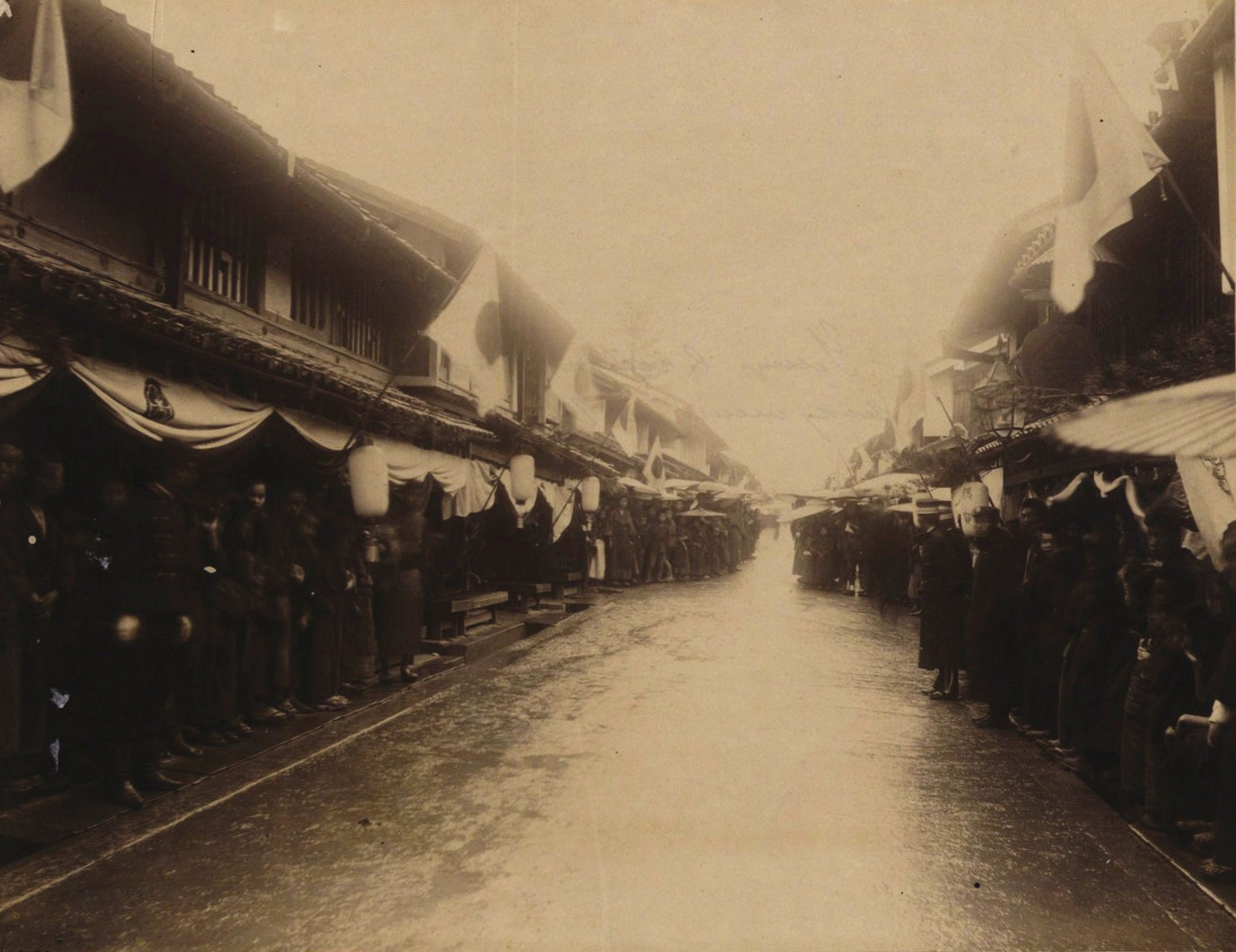 Улица в японском городе Оцу, на которой было совершено нападение на цесаревича Николая Александровича